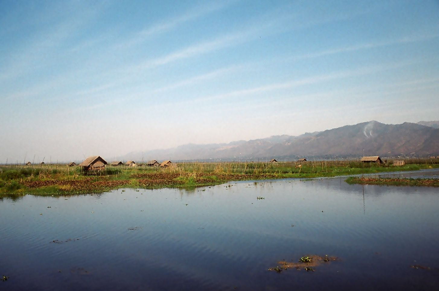 Inle Lake - Floating Village, Myanmar